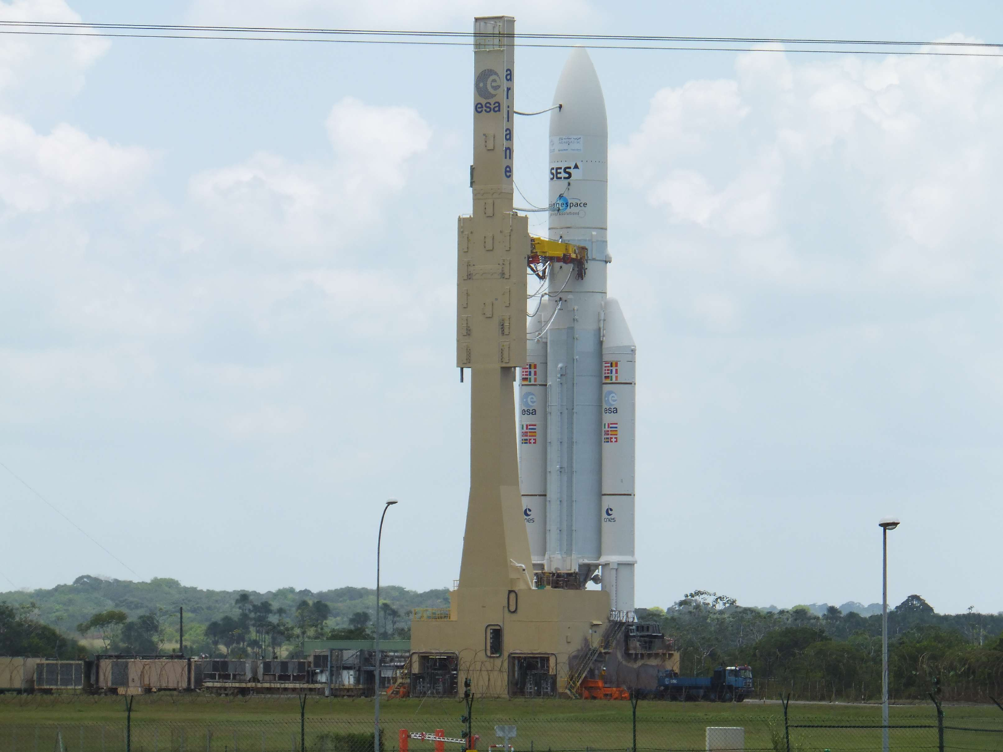 Ariane10